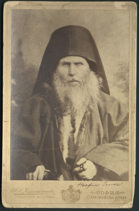 Неофит Рилски